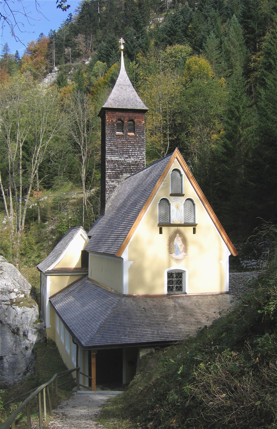 Wallfahrtskirche Maria Klobenstein bei Kössen, Tirol